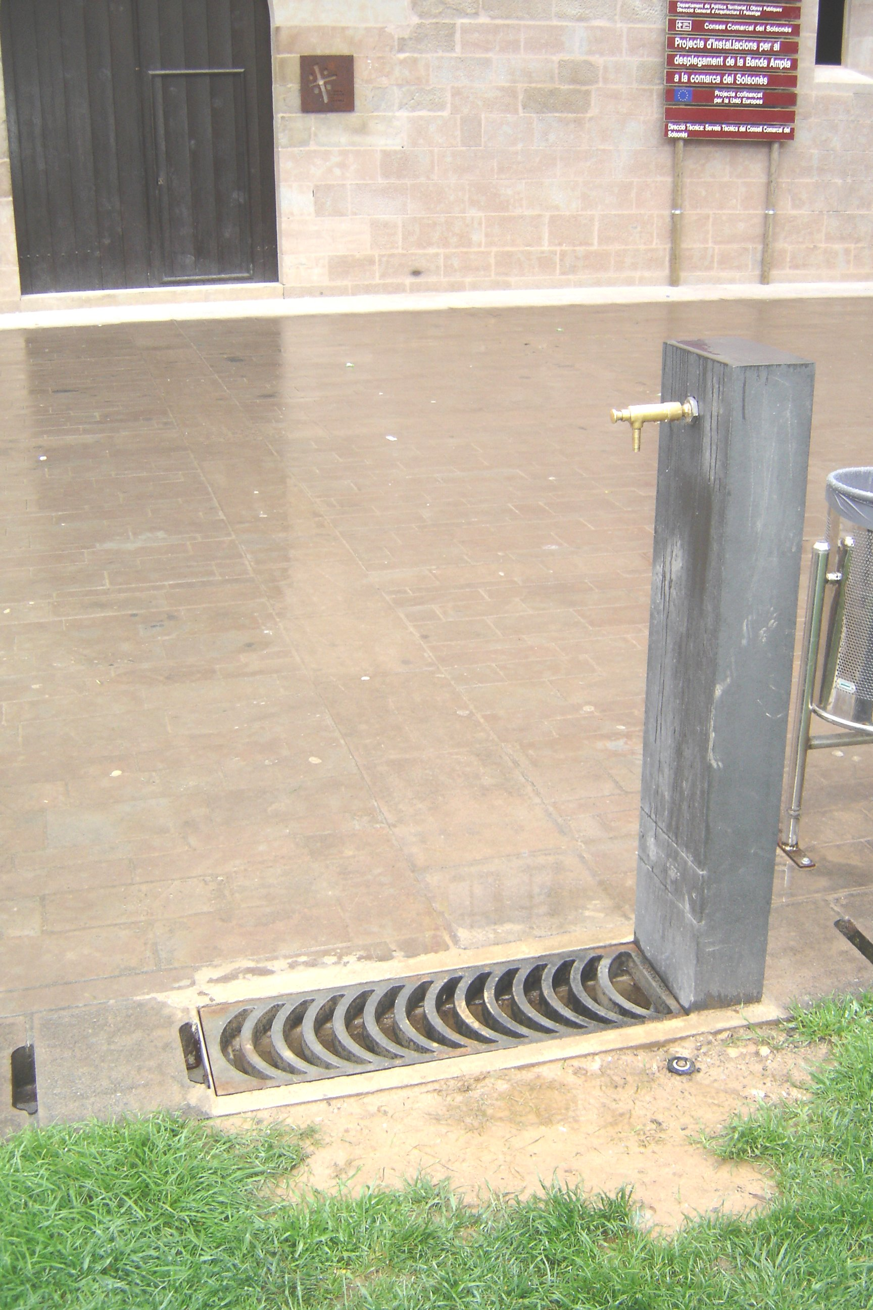 La font de la plaça del palau Llobera, a Solsona (Solsonès)